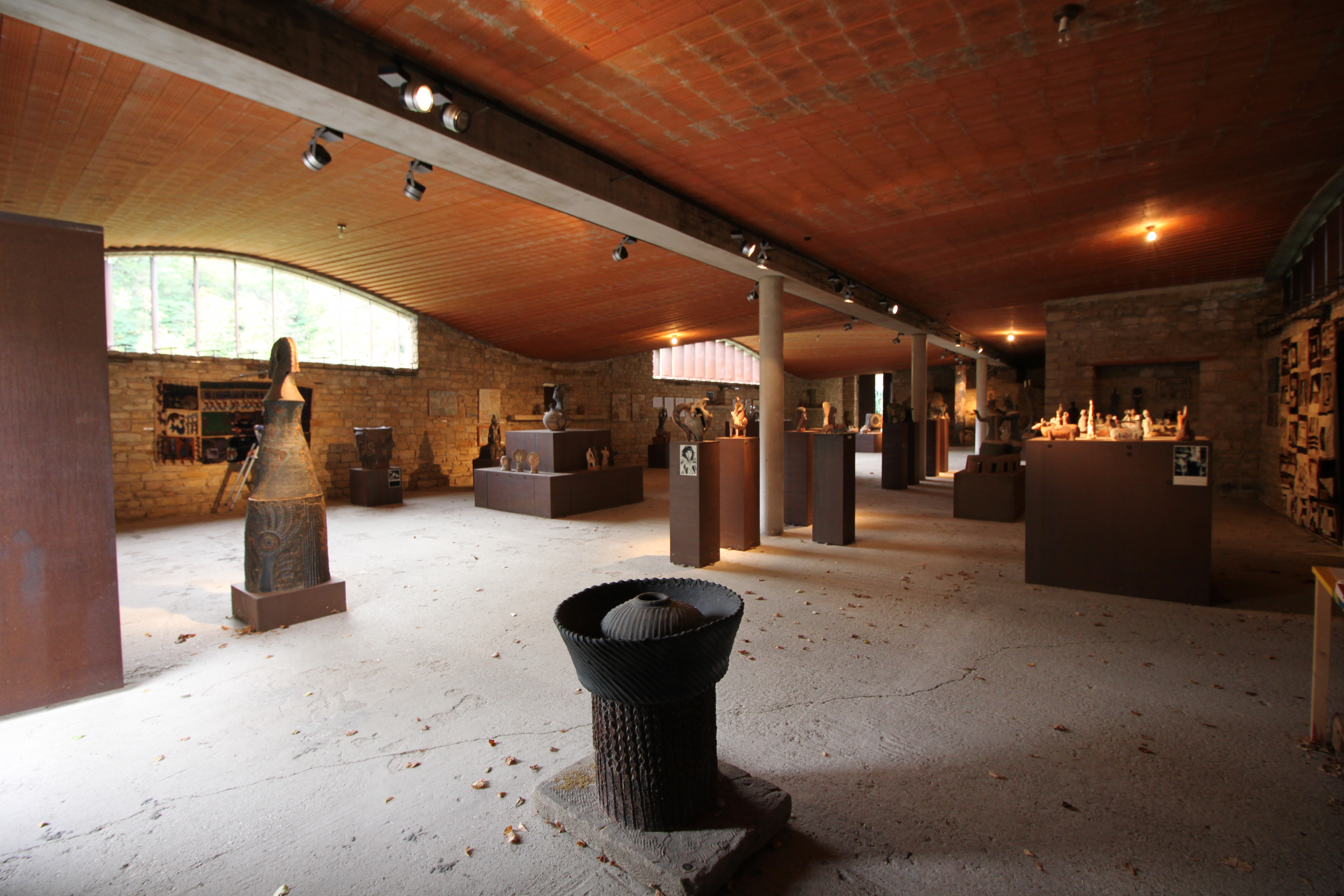 Sommerein – Maria Biljan-Bilger Ausstellungshalle, Halleninnenansicht, vom Eingang nach hinten